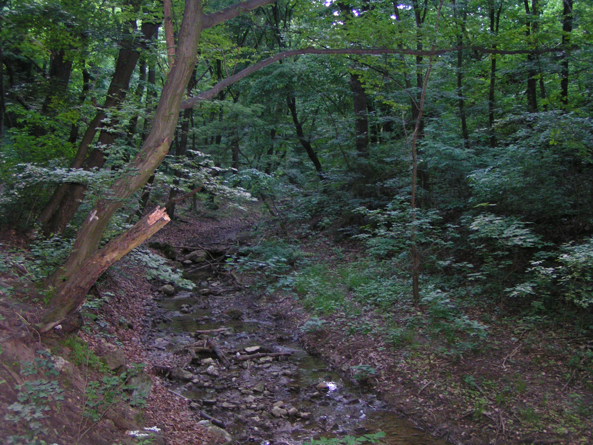 Patak